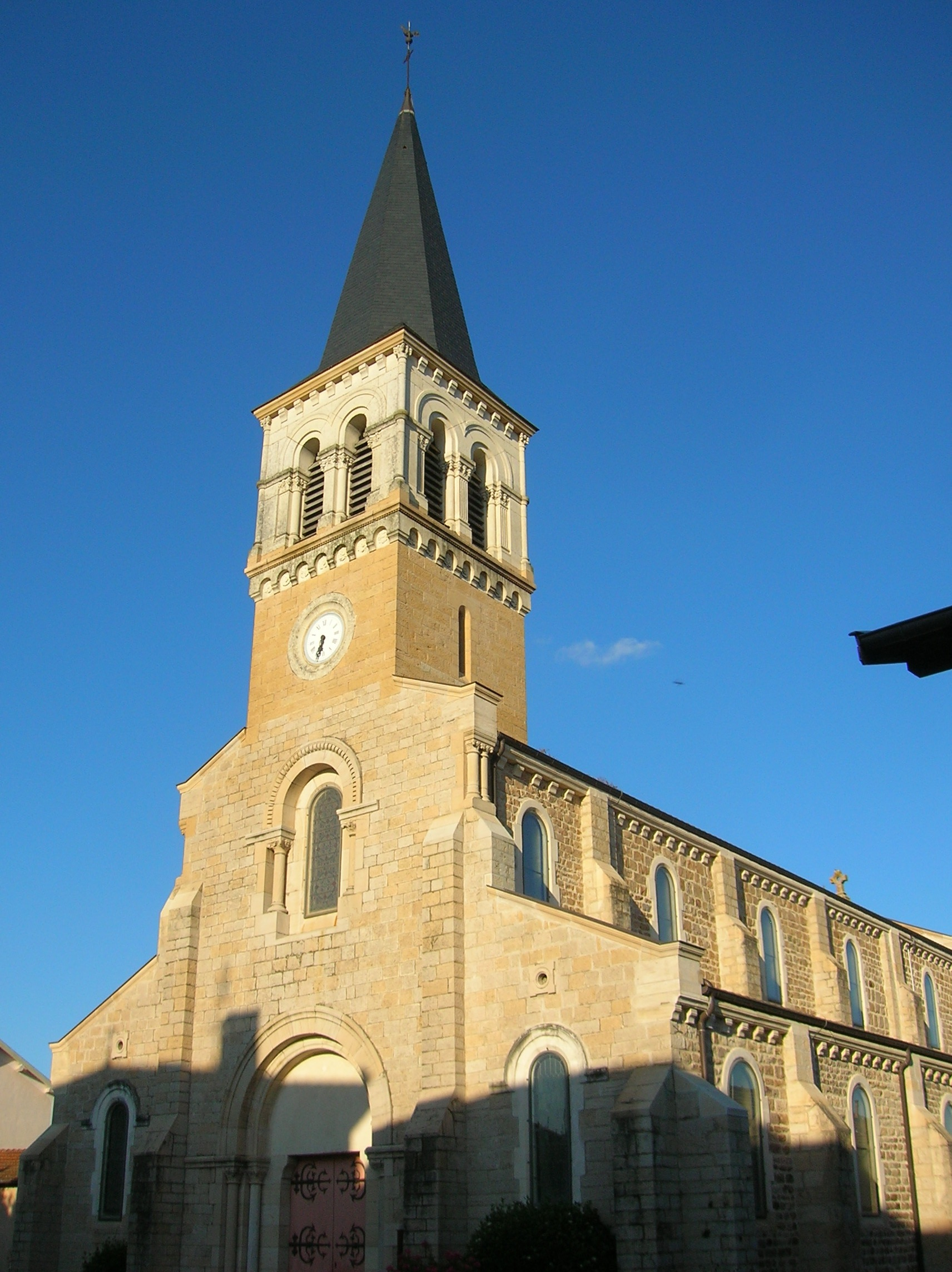 église Lantignié, Rhône, FRANCE